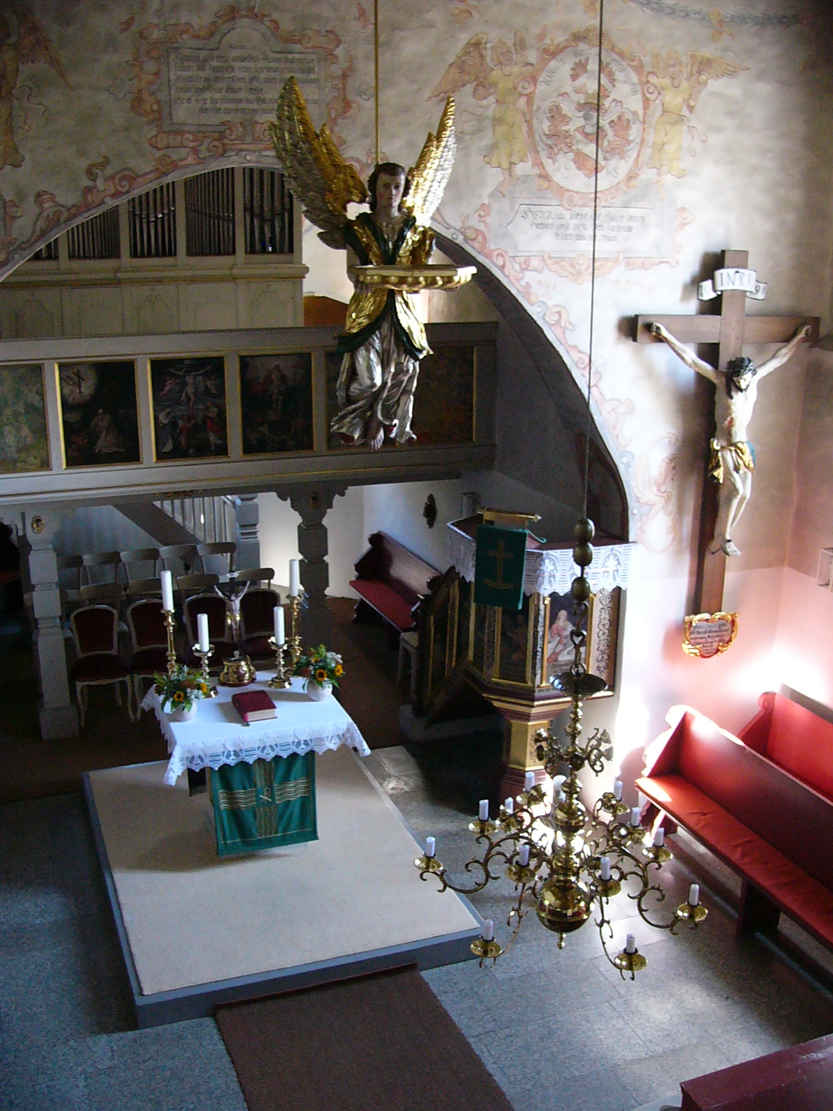 Leonhardskirche Köditz, Blick in den Chor, mit Schwebetaufengel